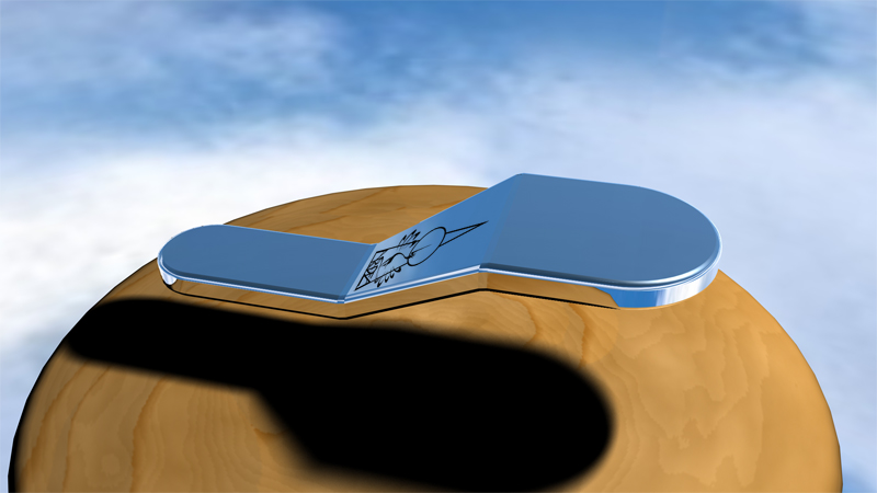 Plessimeter